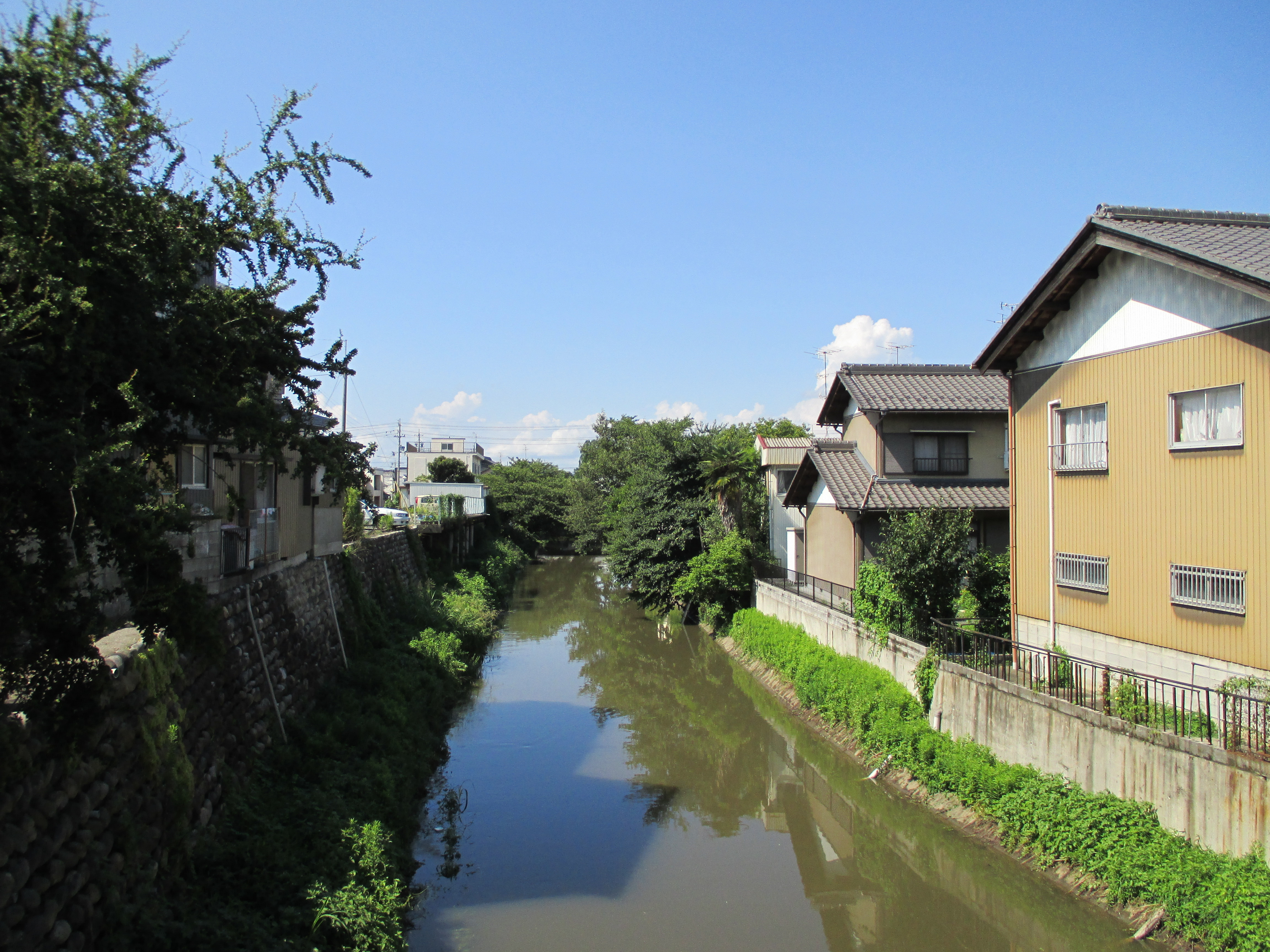 平成橋より北側を撮影